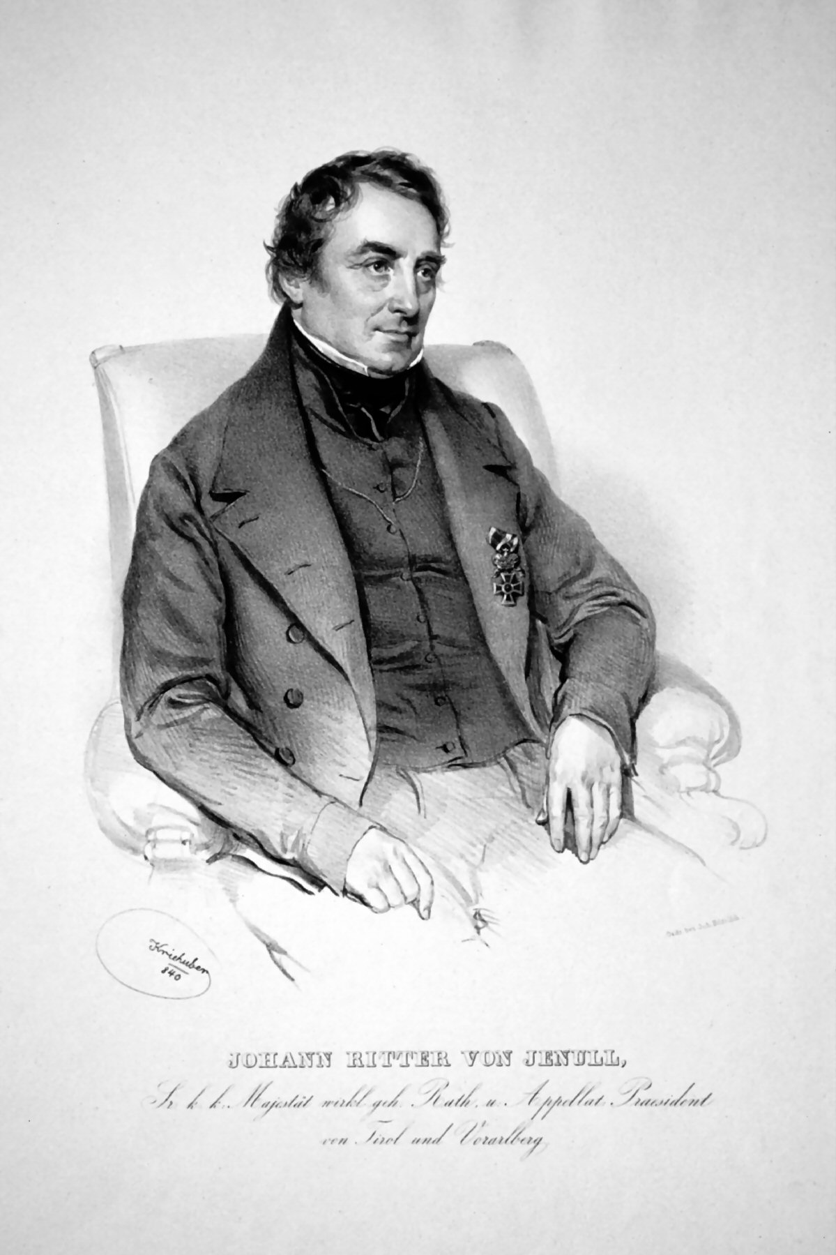 Johann Ritter von Jenull (1773-1853), österreichischer Jurist, Schriftsteller. Lithographie von Josef Kriehuber, 1840